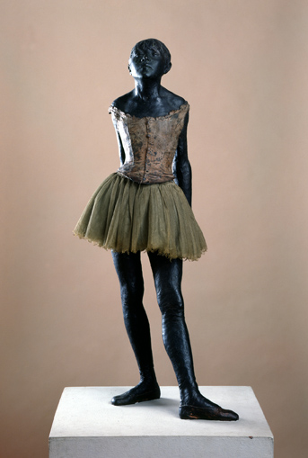 Vierzehnjährige Tänzerin